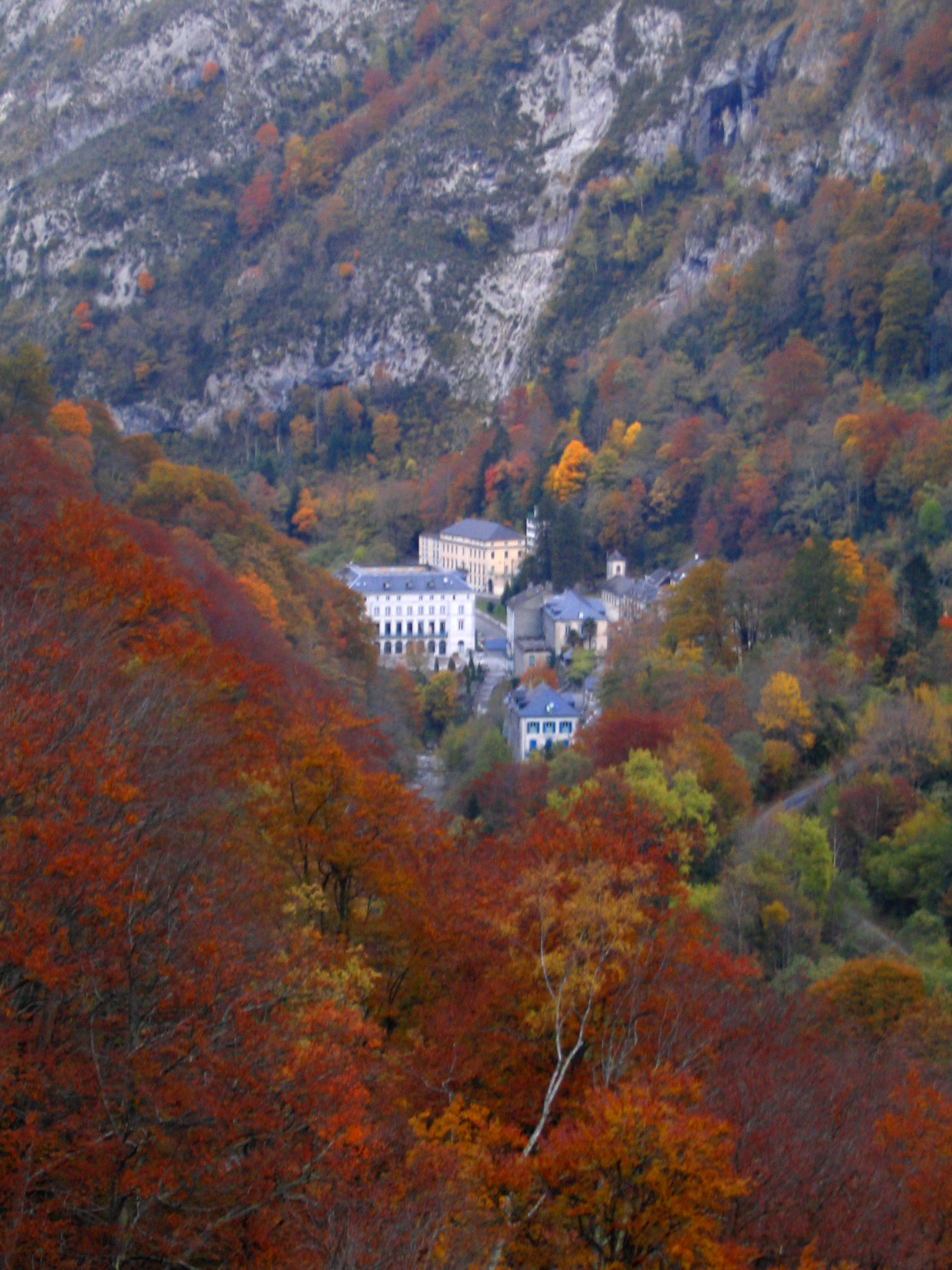 Village des Eaux-Chaudes - Pyrénées Atlantiques - France